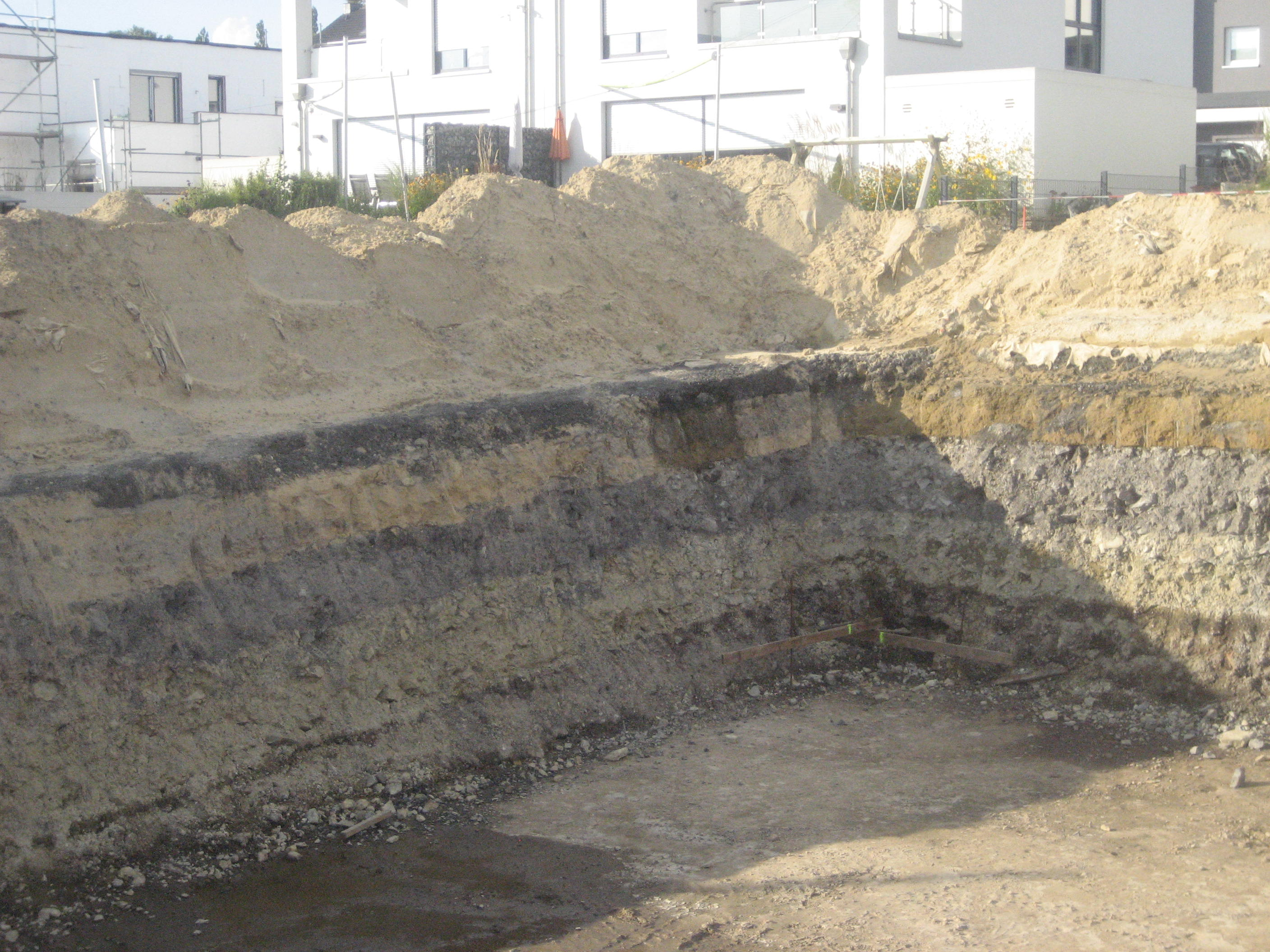 Subsurface on the area of the artificial Lake Phoenix in Dortmund, Germany: distinctly and visibly stratificated by demolition waste and anthropogenic infill.